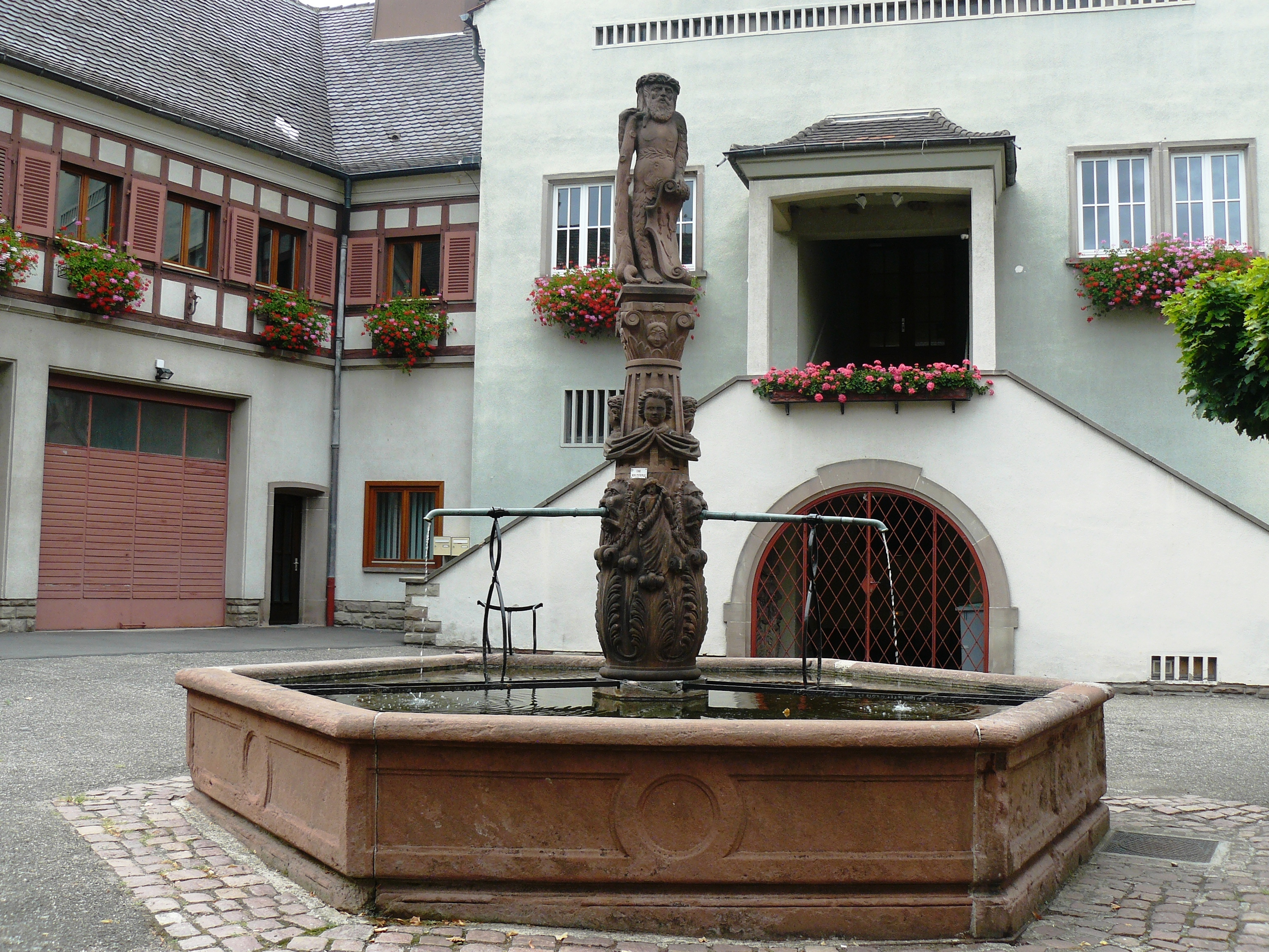 Fontaine de l'homme sauvage (1560) à Ammerschwihr (Haut-Rhin)